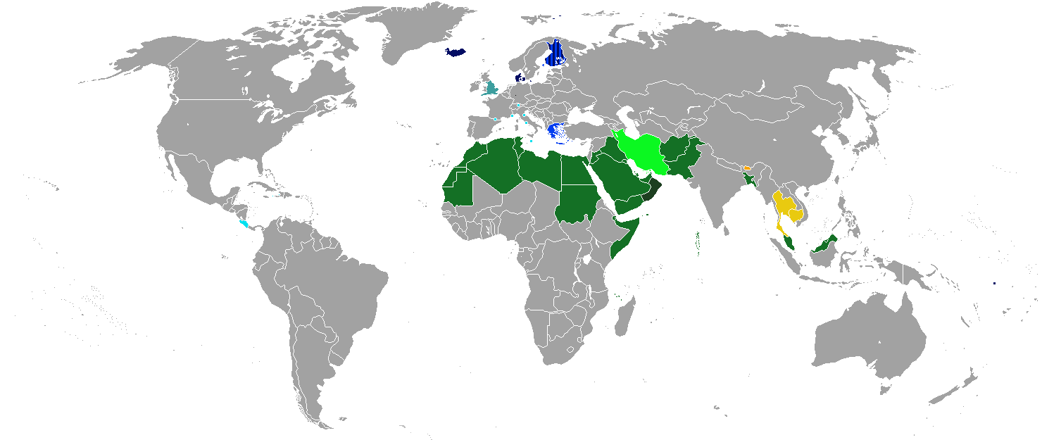 Karte mit Ländern, die eine Staatsreligion haben: Katholisches Christentum Orthodoxes Christentum Evangelisches Christentum Anglikanisches Christentum Theravada-Buddhismus Tibetischer Buddhismus Schiitischer Islam Sunnitischer Islam Ibaditischer Islam Keine Staatsreligion